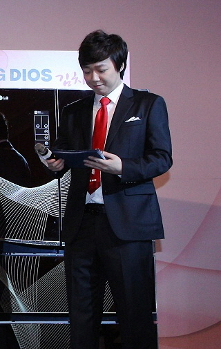 2012년 9월 21일 서울 소공동 플라자호텔에서 개최된 ‘LG 디오스 김치톡톡쇼’ 행사에서 CF 모델로서 출연한 김기열